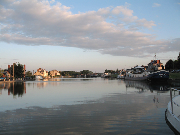 Ancien bassin d'attente des péniches pour le chargement et le déchargement sur le canal latéral à la Loire dans le village de Marseilles-les-Aubigny.